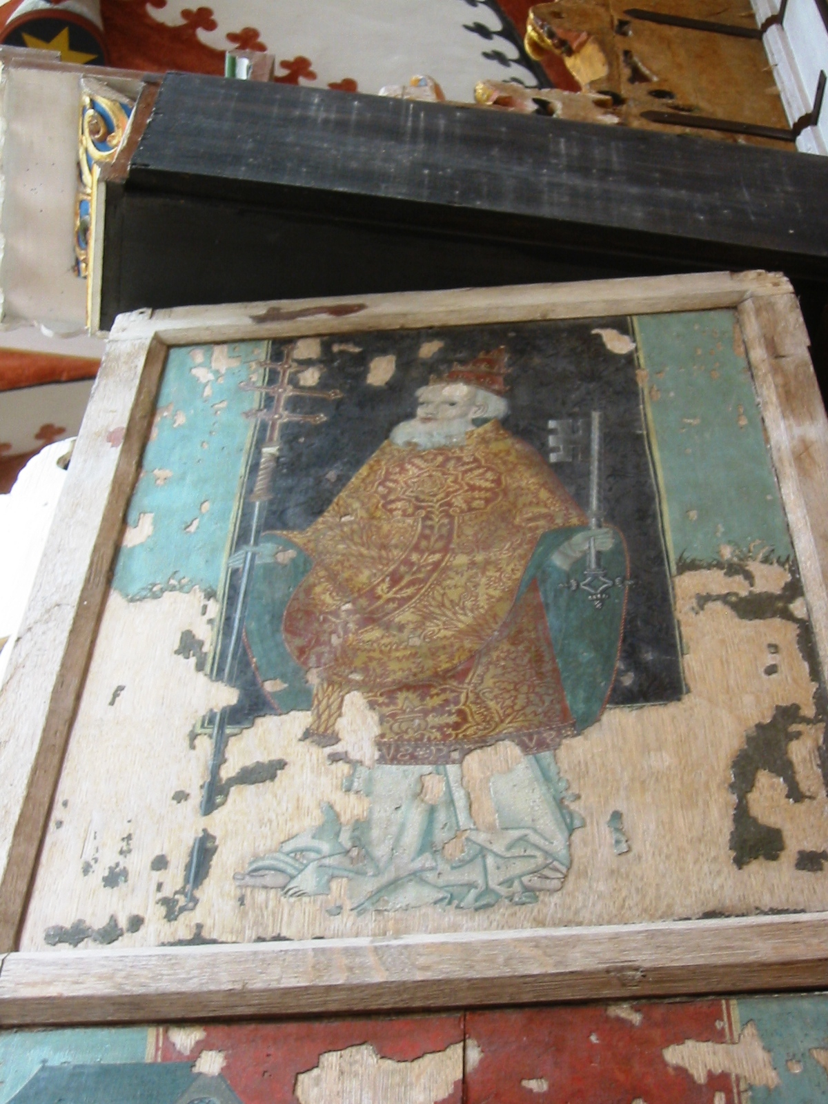 Altaraufsatz mit einer Abbildung von Petrus in der Kirche in Wusterhusen, Vorpommern-Greifswald, Mecklenburg-Vorpommern